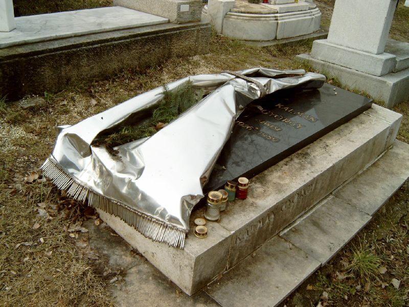 Kálmán György sírja Budapesten. Farkasréti temető: 22/1-1-9.